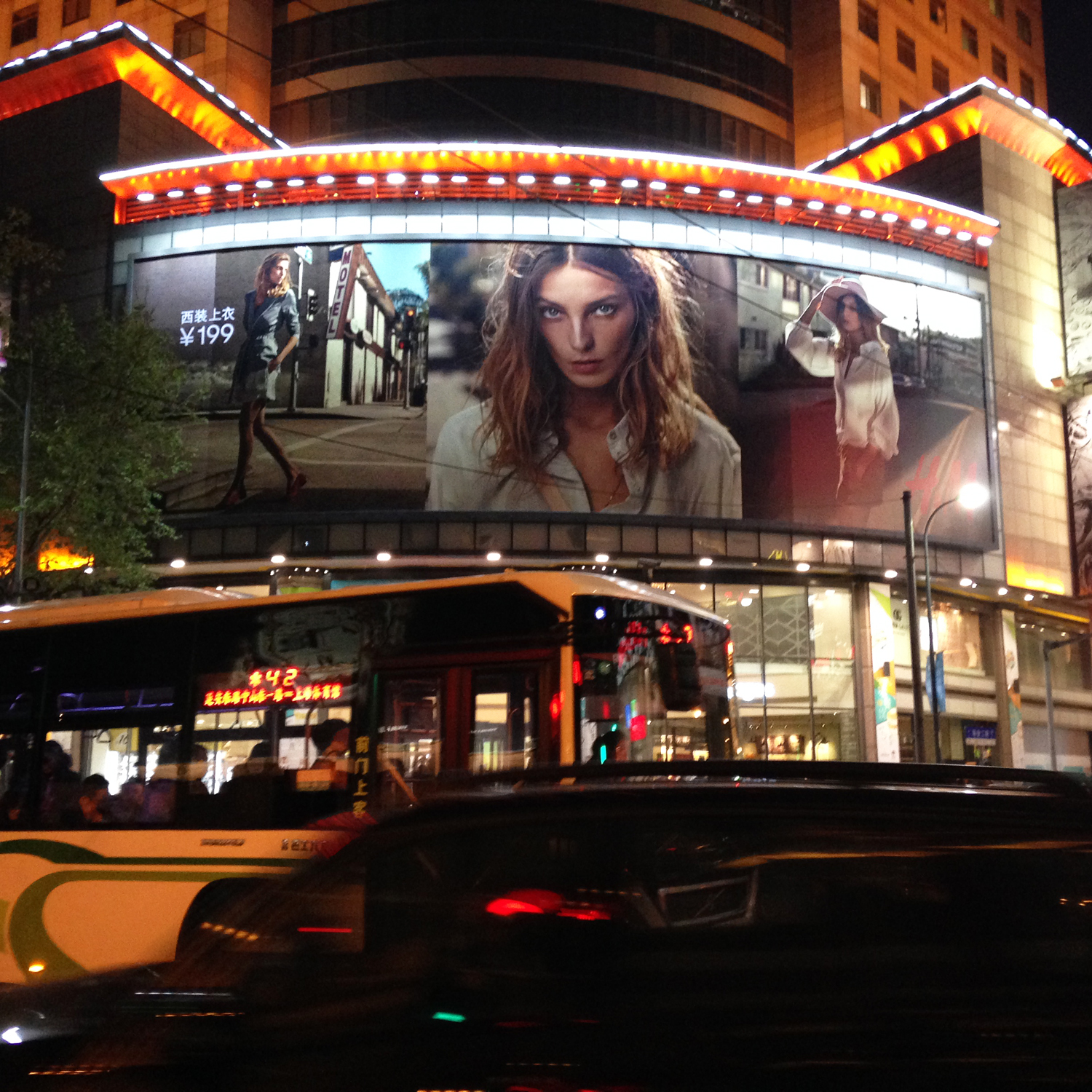 Shanghai H&M Spring-Summer Campaign 2015